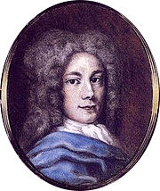 Портрет Генделя